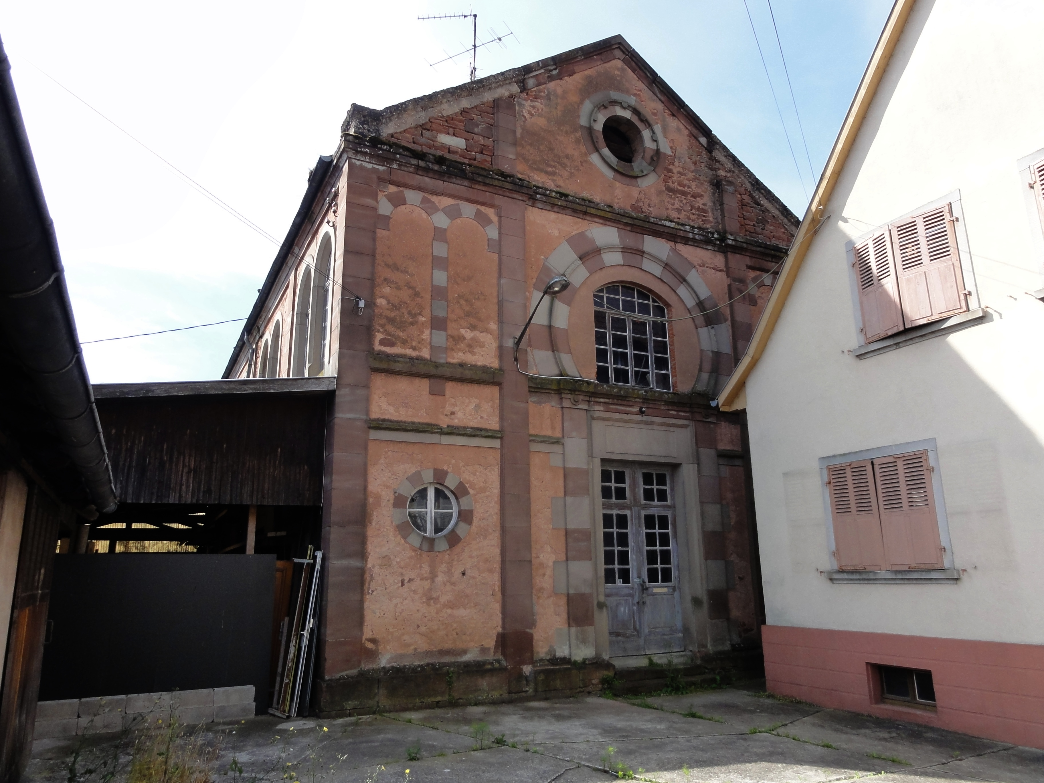 Alsace, Bas-Rhin, Neuwiller-lès-Saverne, Synagogue (1875), 5 Faubourg du Maréchal-Clarke.